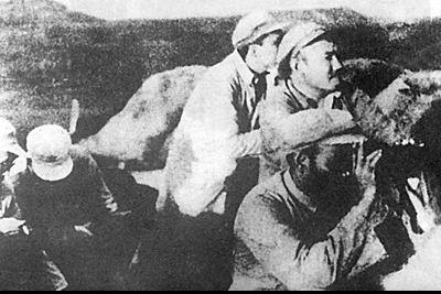 1949年的长山列岛战役，是人民解放军渡海作战的首例。图为许世友在解放长山列岛的前沿指挥阵地上